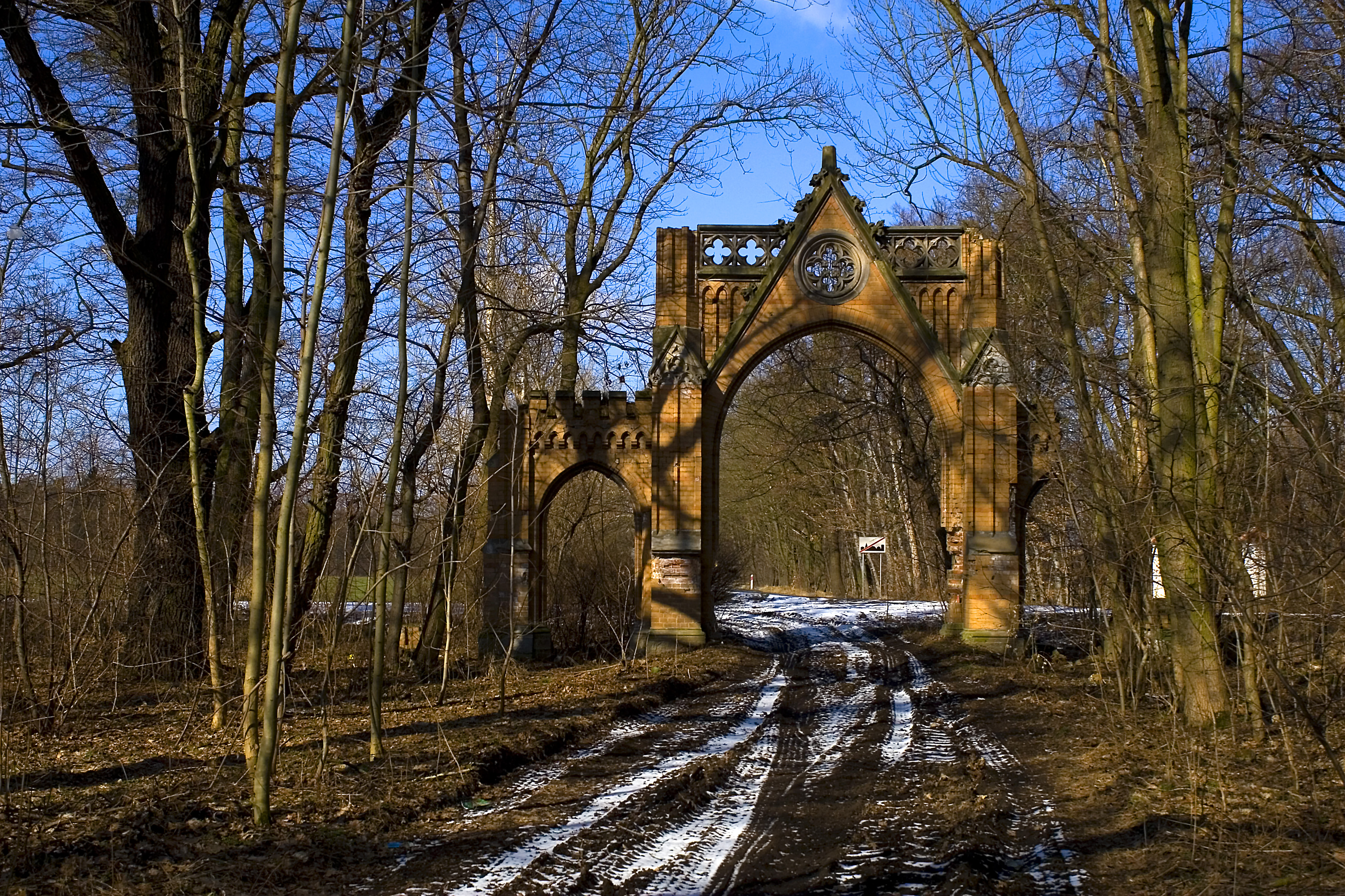 XIX - wieczna brama wjazdowa zespołu pałacowego w Kopicach, gmina Grodków. Powiat brzeski 07.1981.